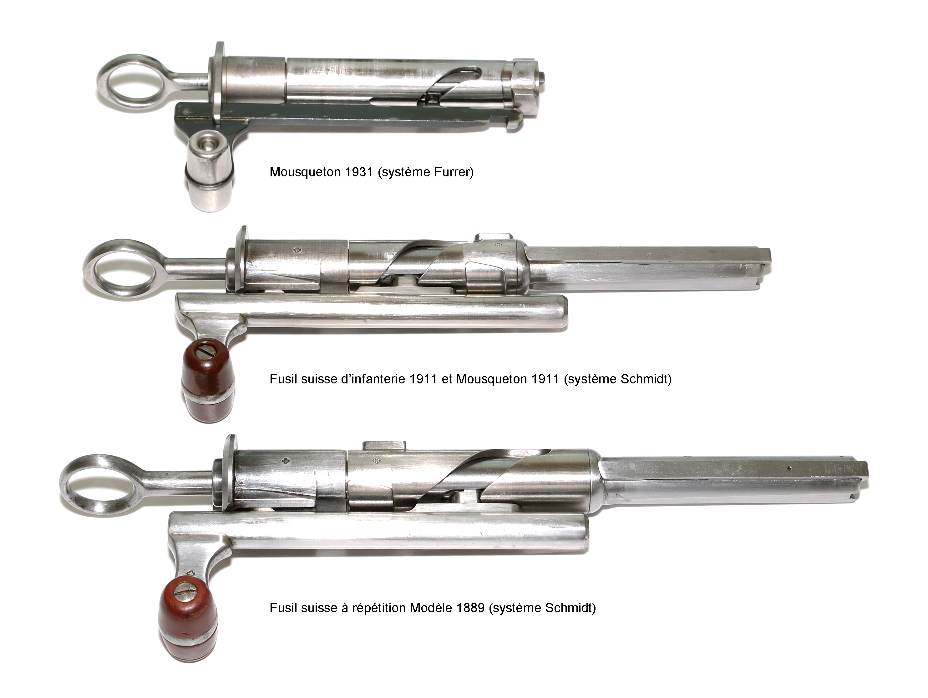 Culasse du Fusil suisse à répétition Modèle 1889, Fusil suisse d’infanterie 1911, Mousqueton suisse 1931